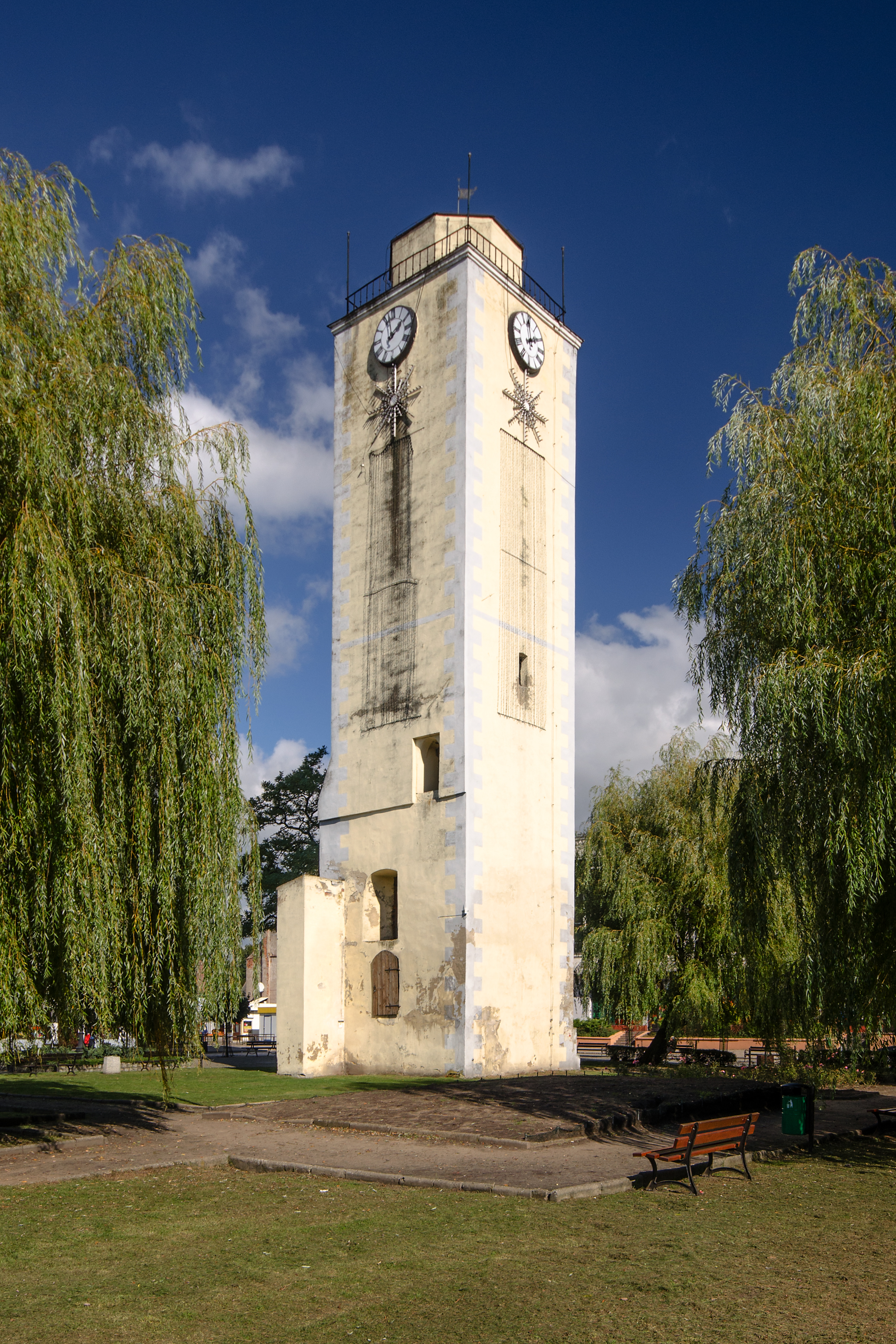 Bierutów, wieża ratuszowa, XV/XVI